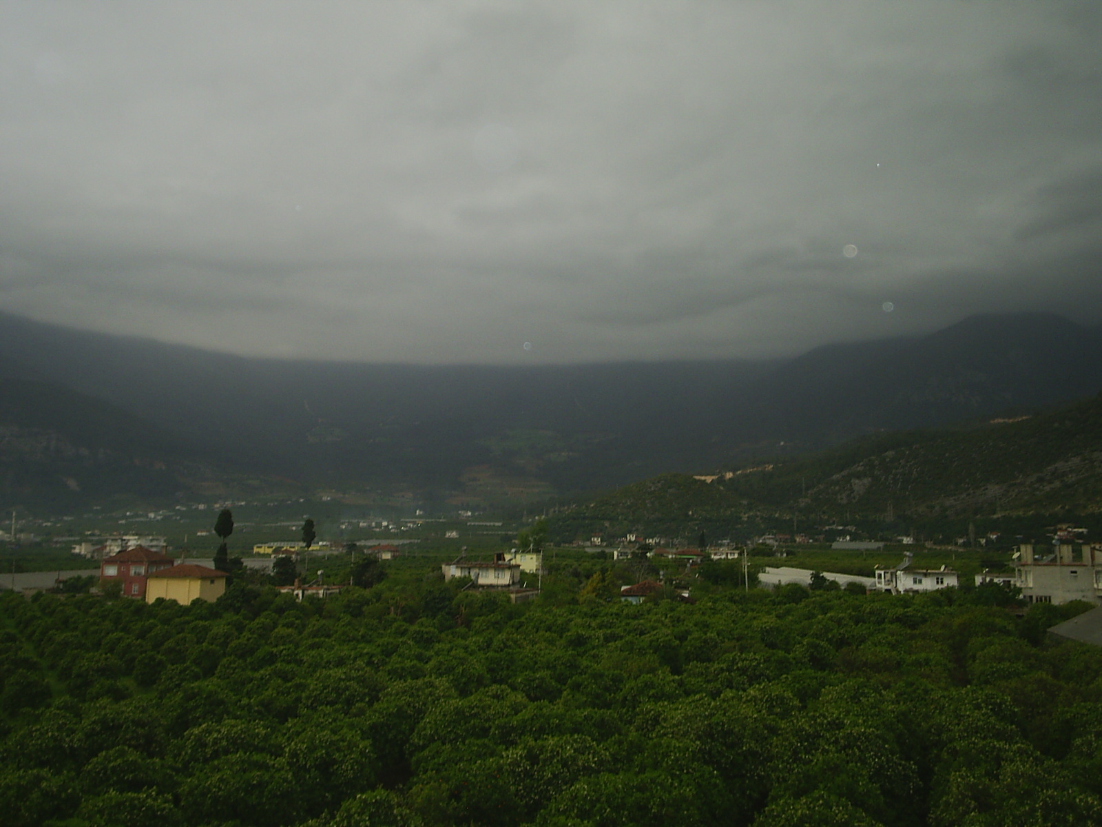 gülmez dağı turunçova 0242 852 1988